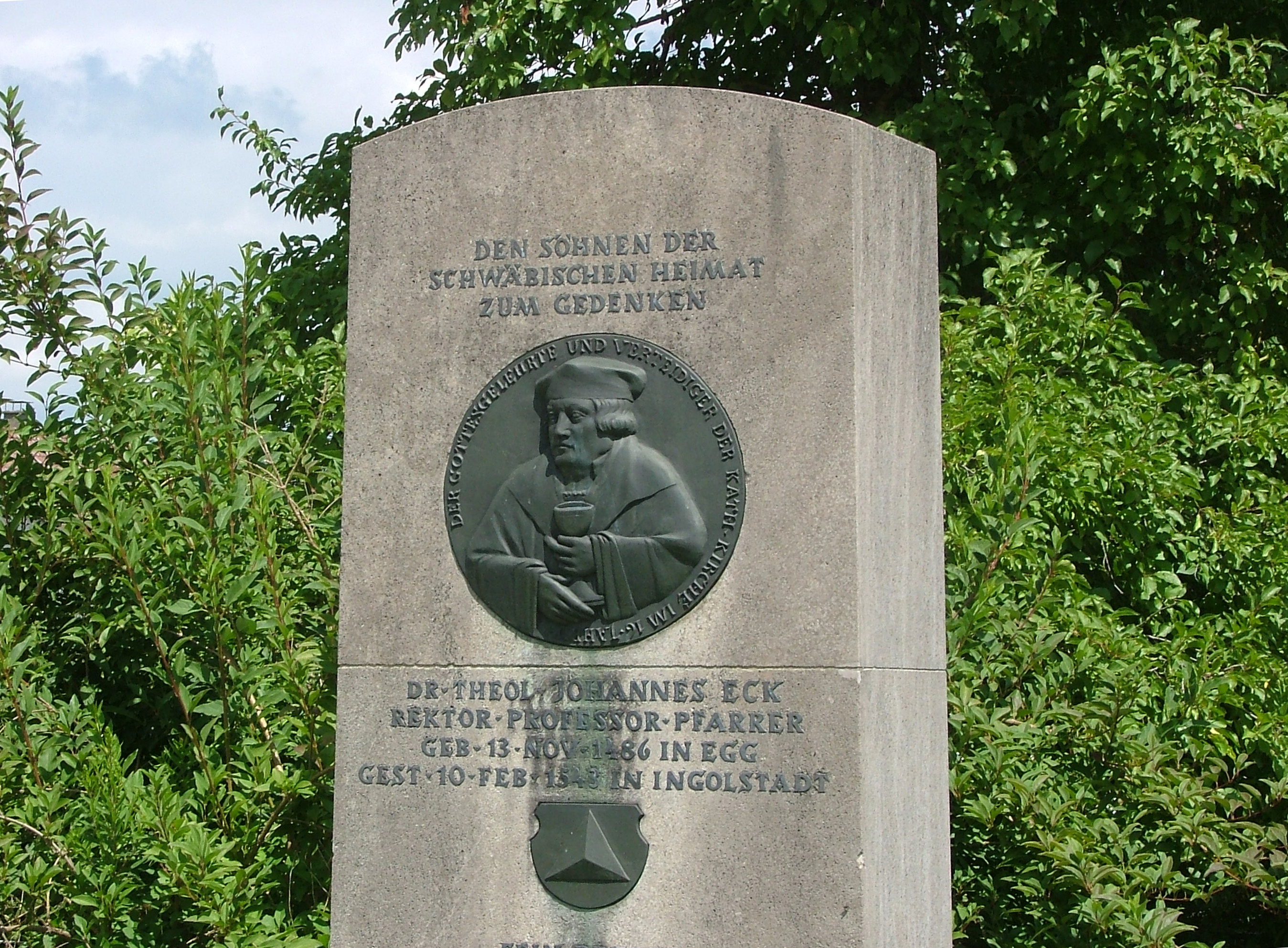 Egg an der Günz